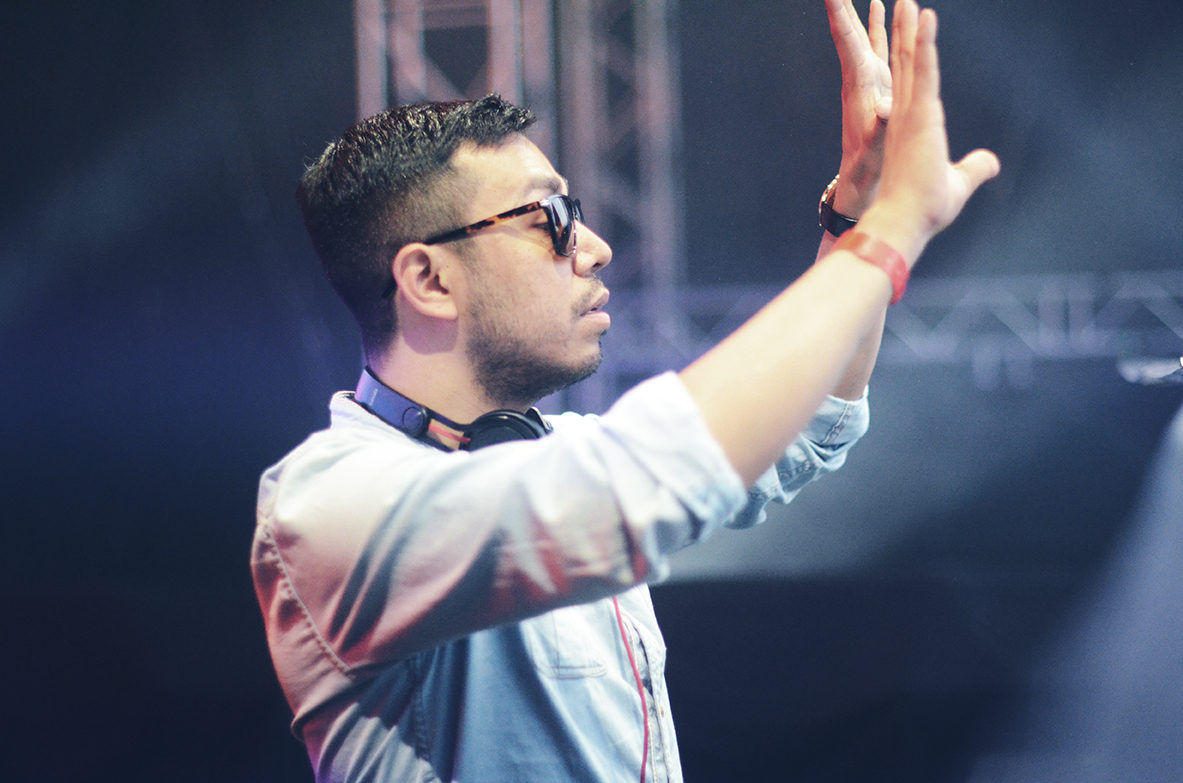 Alberto Canas spelar Main Stage på Summerburst 2013.